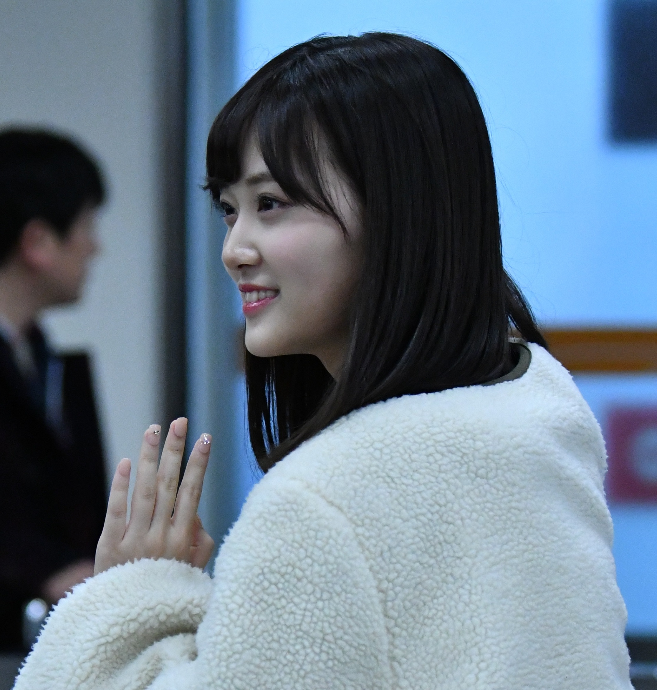 台北松山空港での山下美月